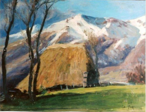 Vue d'un buron dans les Monts d'Auvergne, près de Raymond, Mandailles, Cantal, France. Peinture à l'huile de Charles Jaffeux (1902-1941)